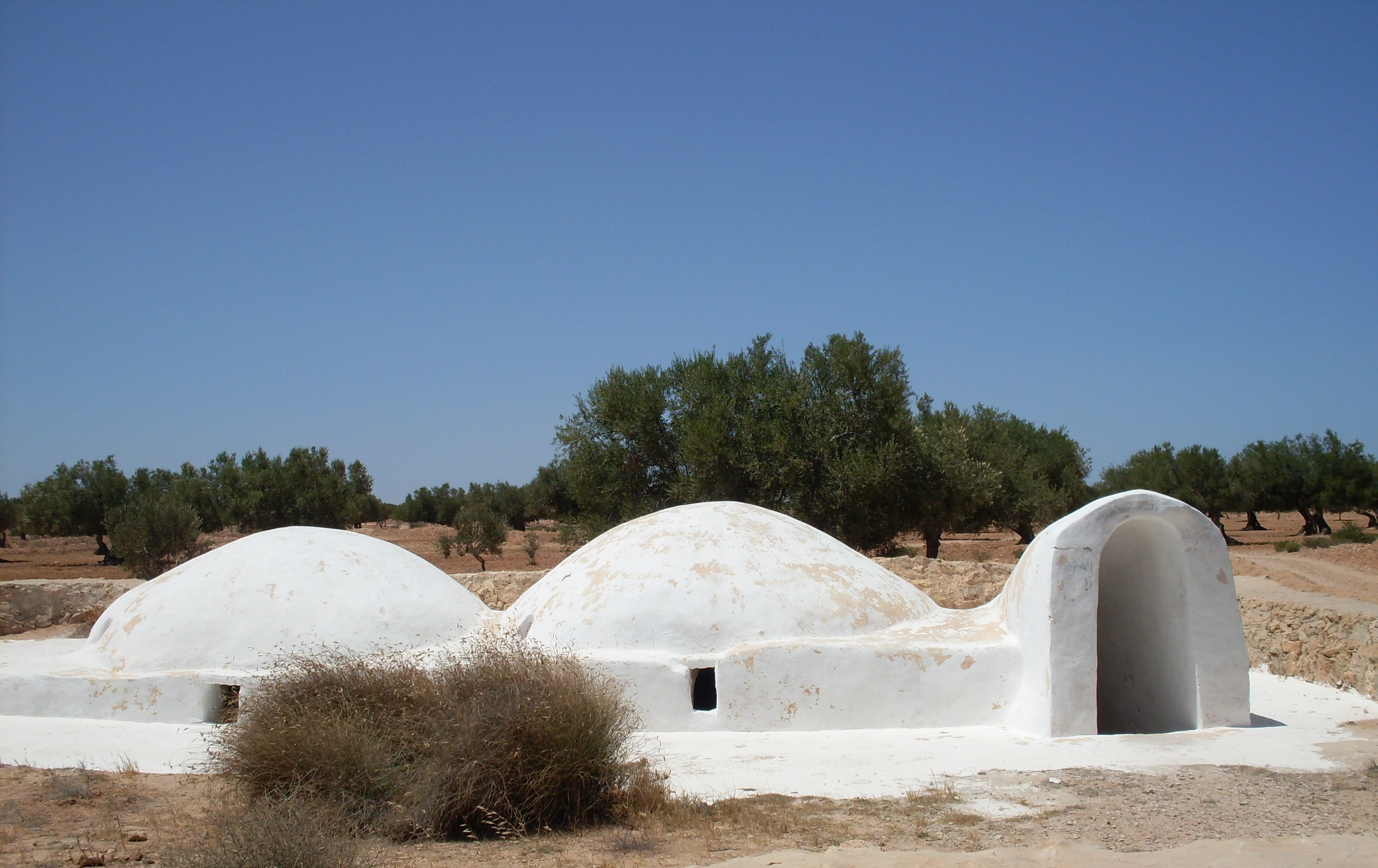 Mosquée sous terraine de Sedouikech "Jemàa Loutàa"